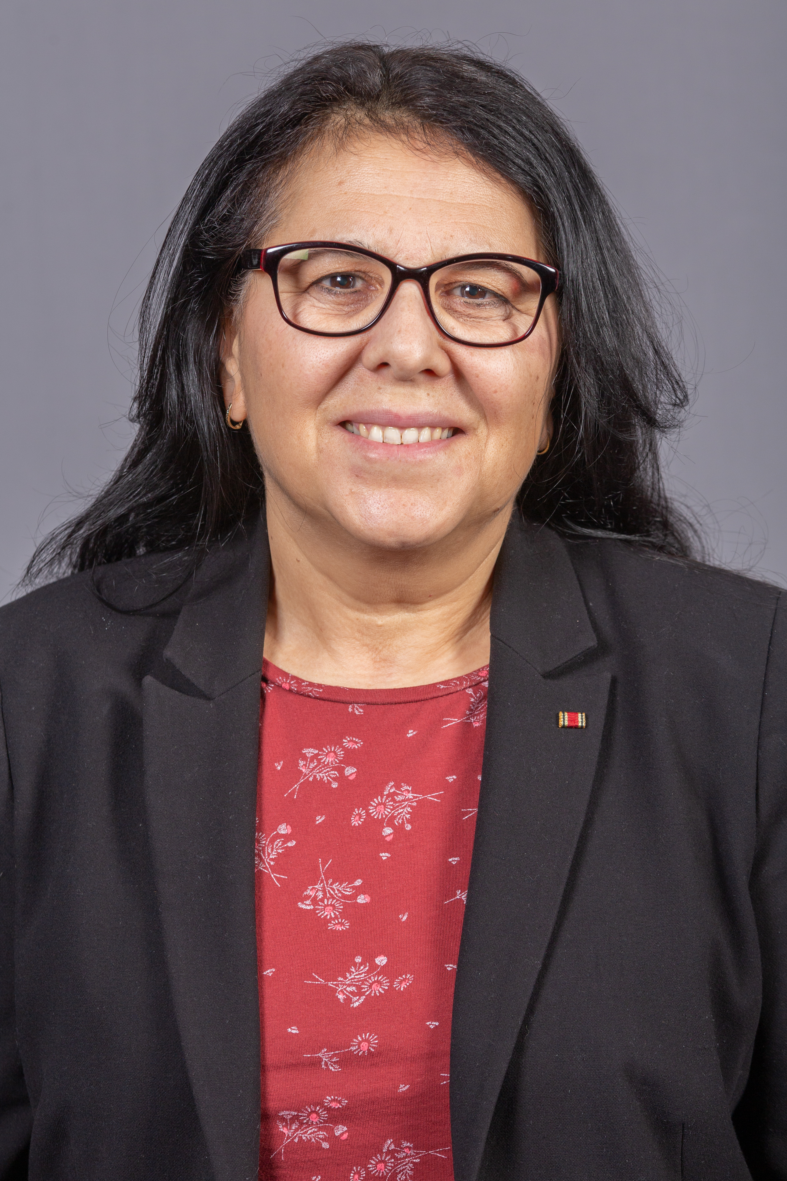 Deutscher Bundestag; Gülistan Yüksel, SPD